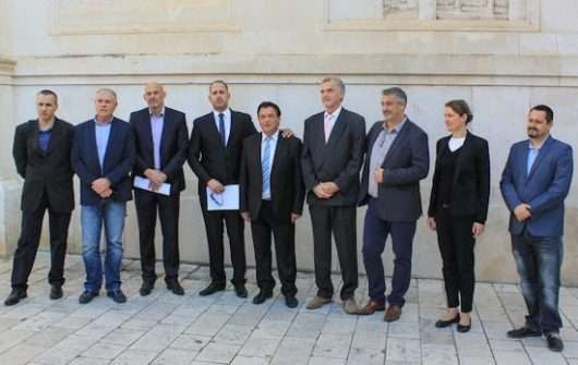 Zadarski blok na Narodnom trgu u Zadru na predstavljanju.